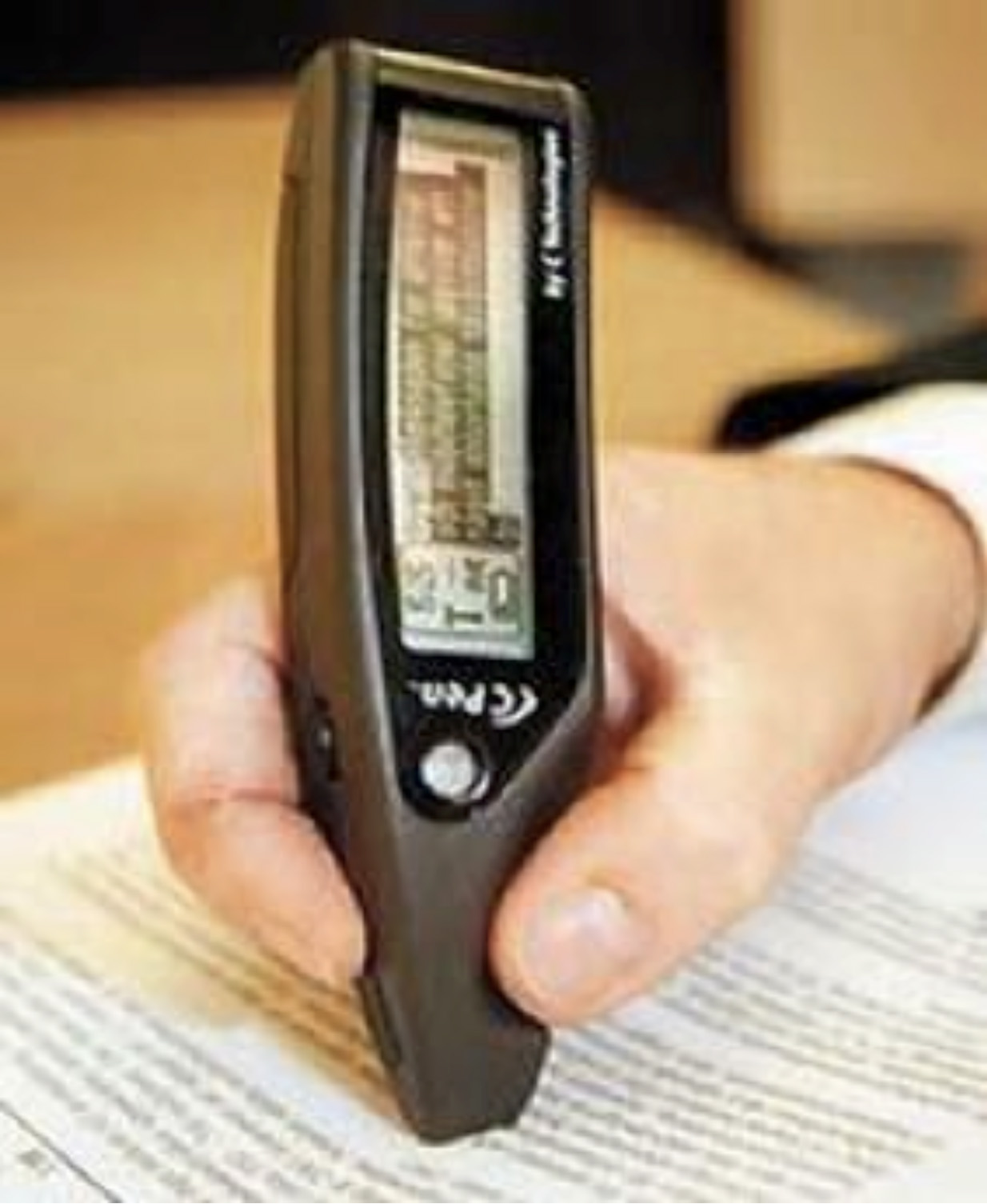 C pen Original, designad av Johan Berhin och Olle Wranne, 1998